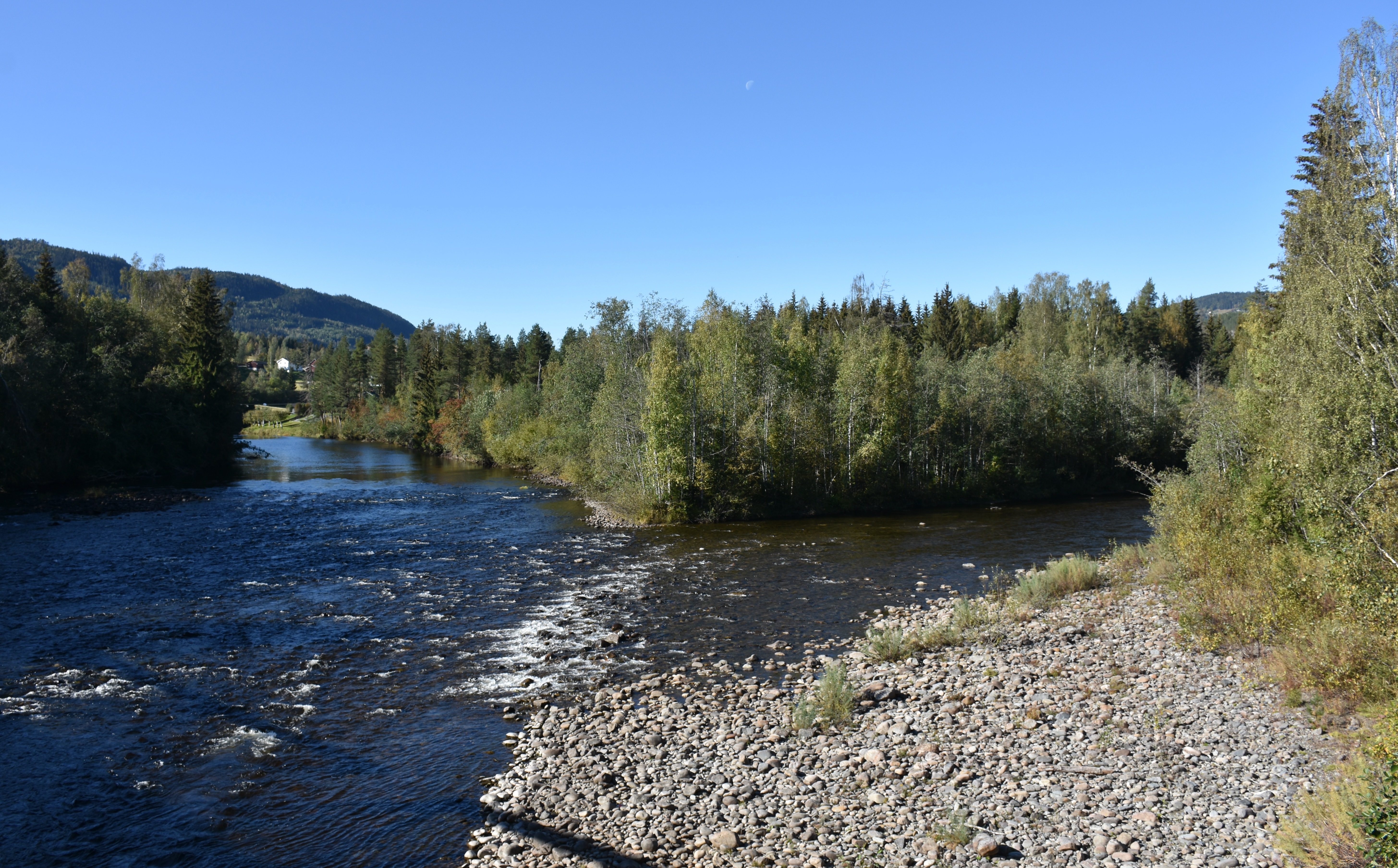 Dokka og Etna møtes like over jernbanebroen utenfor Dokka tettsted.